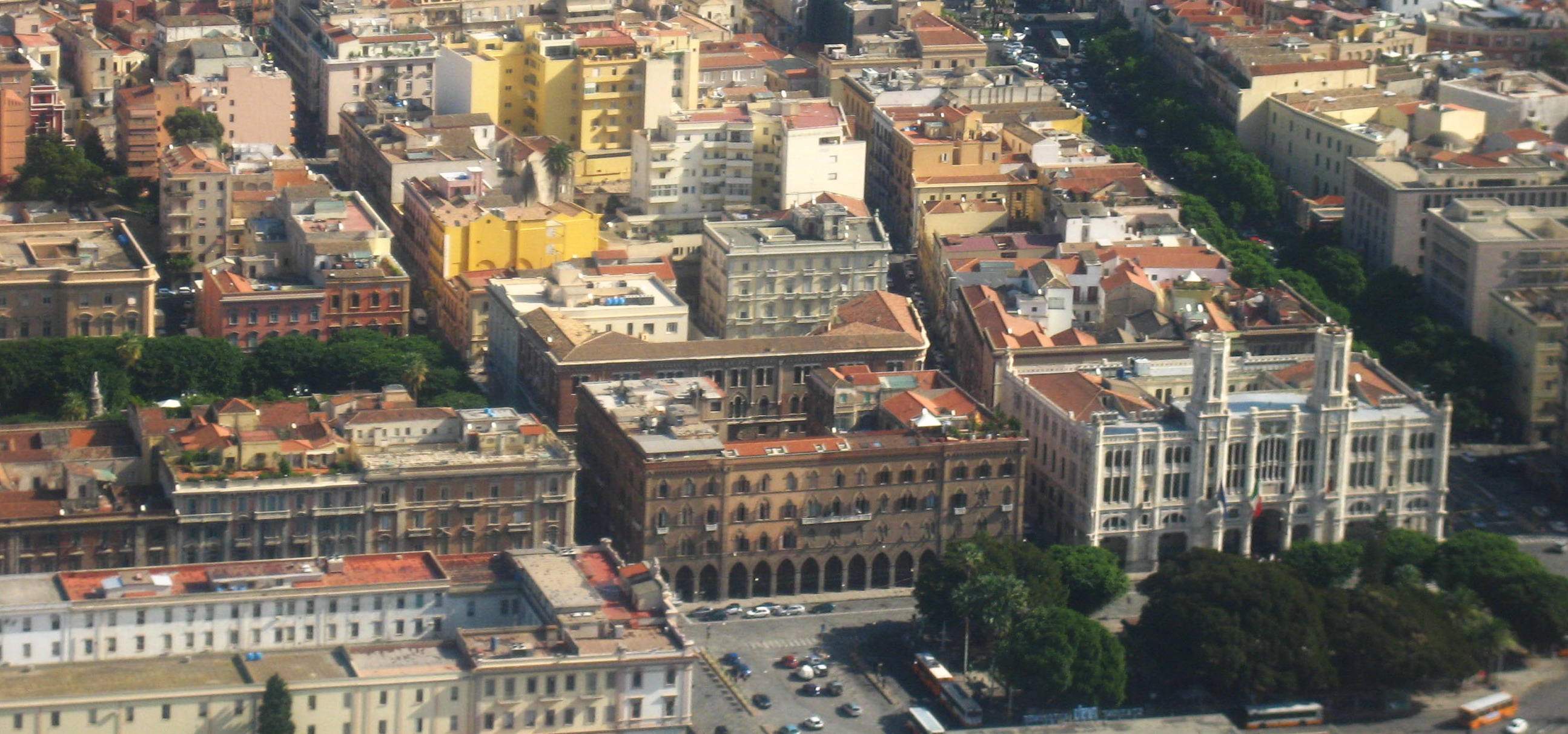 Panoramica di Via Roma a Cagliari